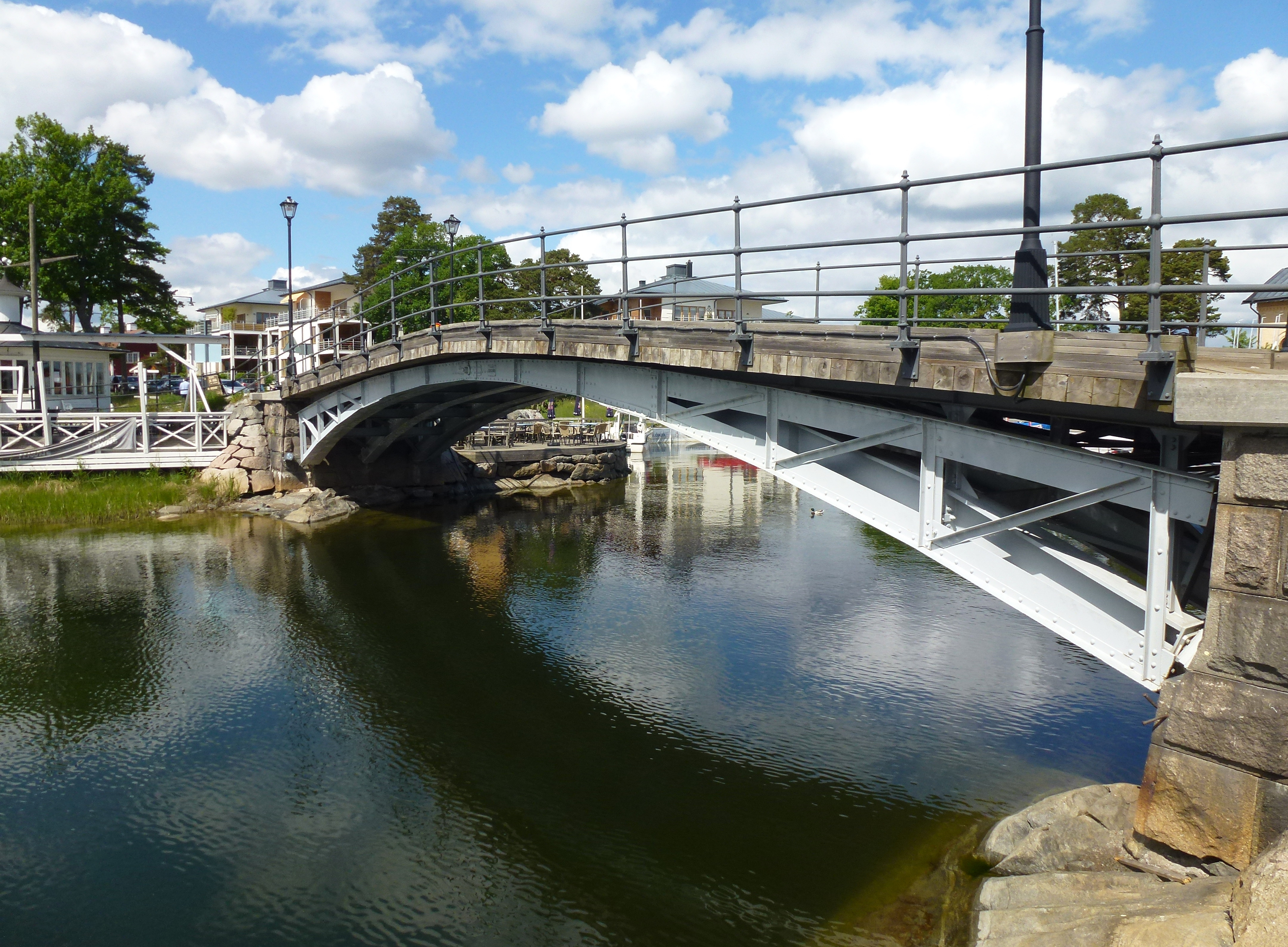 Bron till Restaurangholmen utanför Grand Hotel, Saltsjöbaden, tillverkad av Bersunds Mekaniska Verkstad 1892